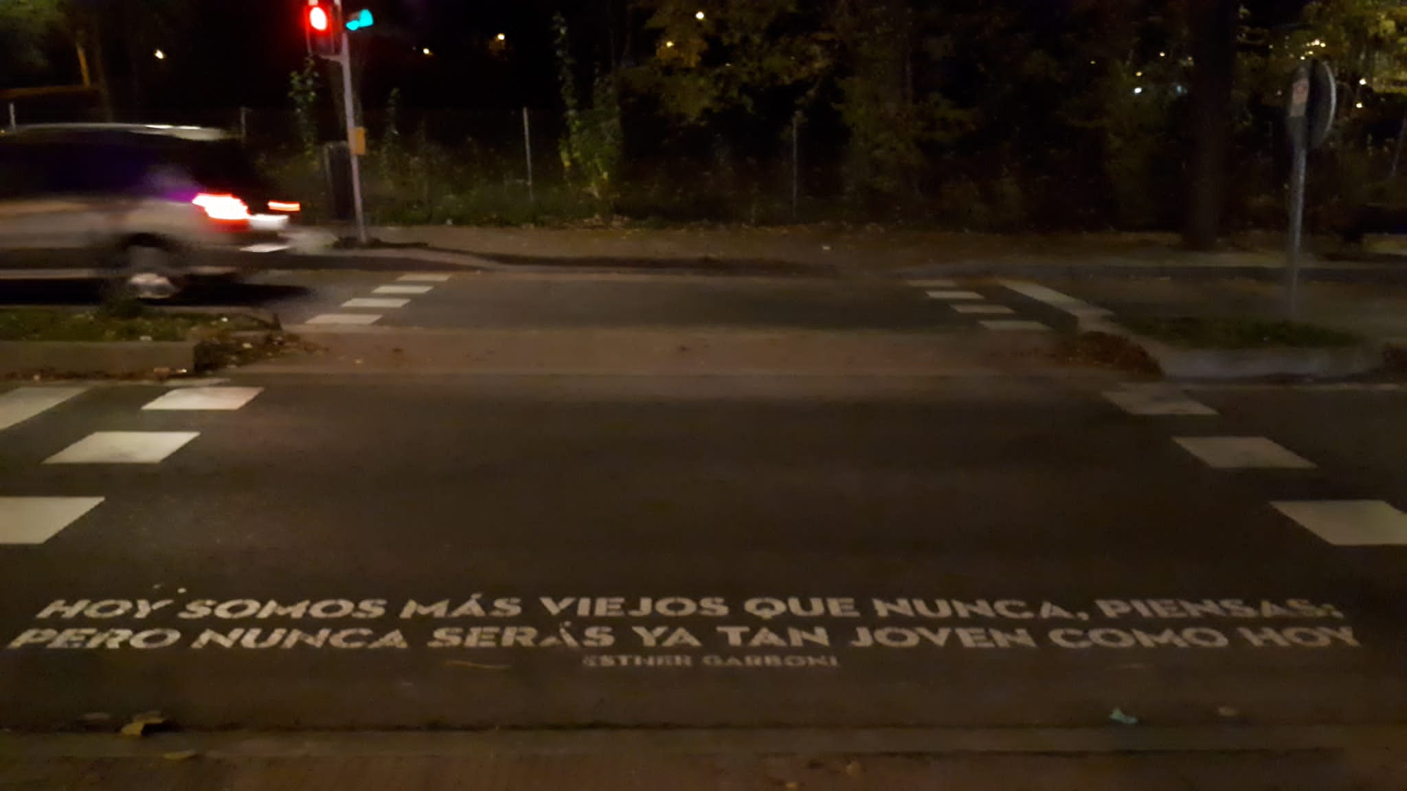 Pasos de peatones con versos escritos en el asfalto (Madrid, España). Iniciativa artística de Boa Mistura con el patrocinio del Ayuntamiento de Madrid. "Hoy somos más viejos que nunca, piensas: Pero nunca serás tan joven como hoy". (Esther Garboni).